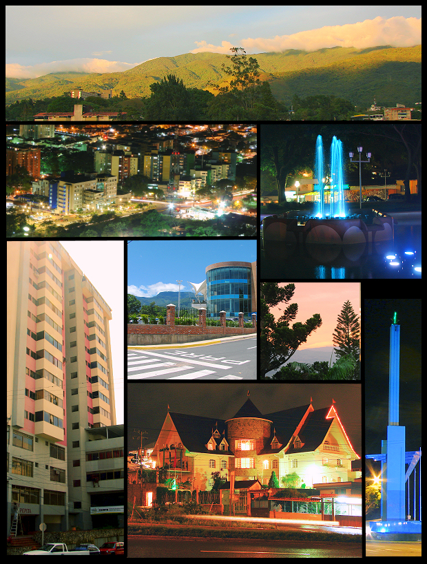 Collage de imágenes de la Ciudad de San Cristóbal